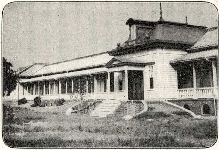 中文（台灣）: 臺中小學校